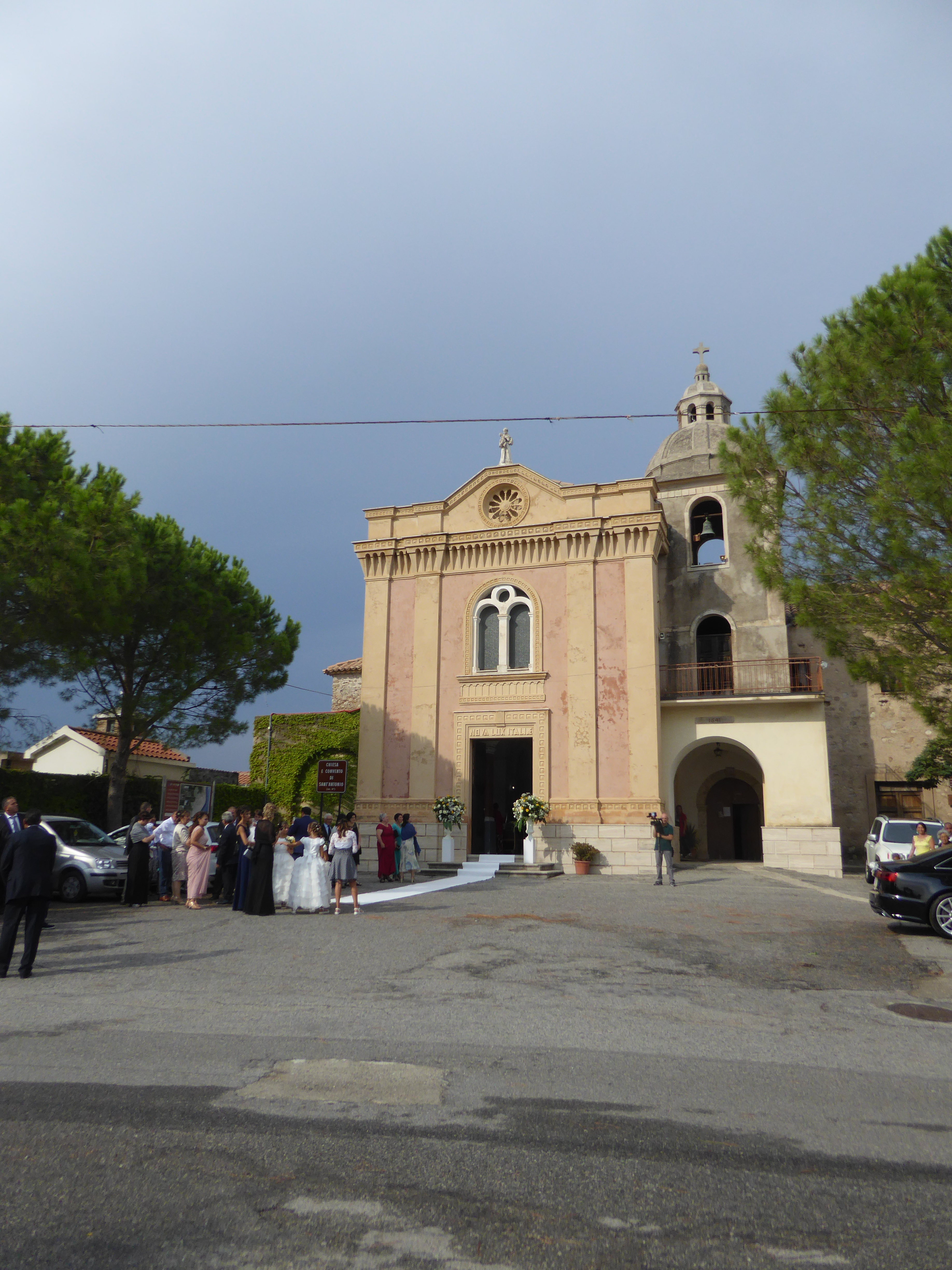 Convento di Sant'Antonio a Stignano 2018